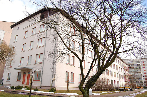 Ventspils Augstskola